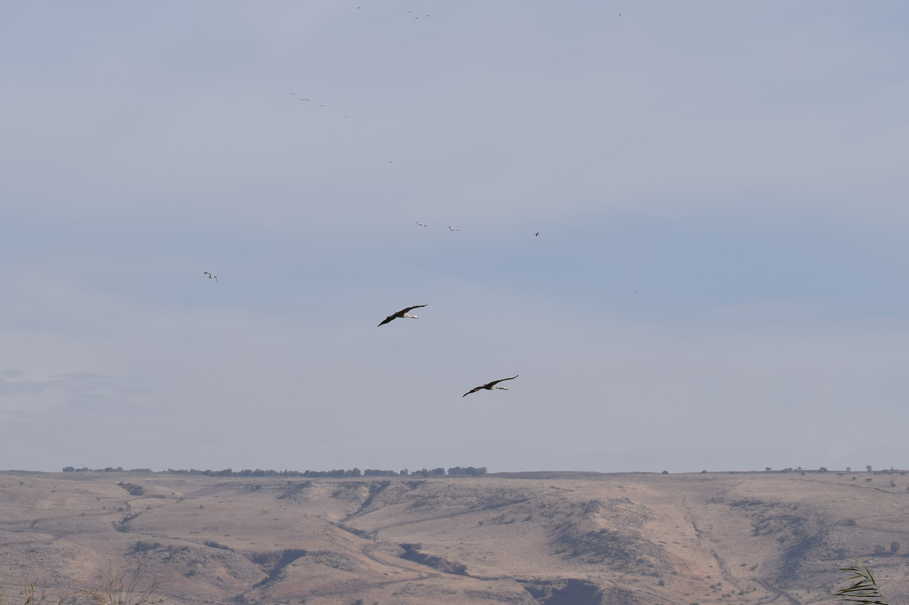 עגורים בשמי אגמון החולה